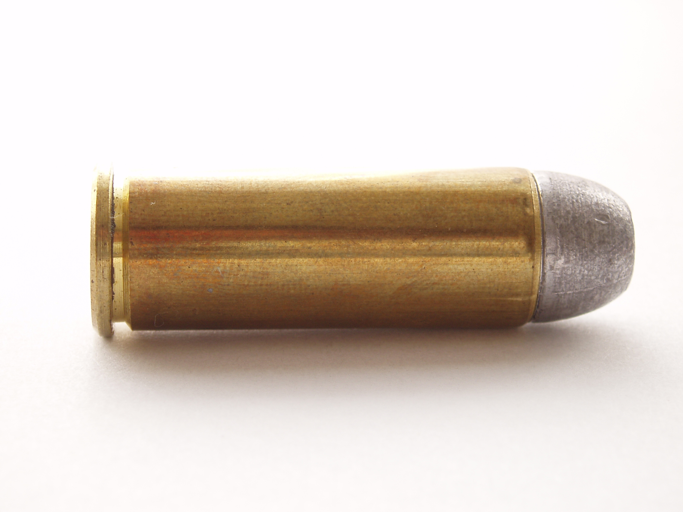 .45 Colt cartridge.